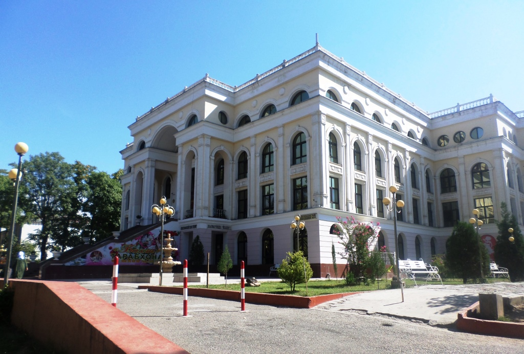 Дворец бракосочетания в г. Душанбе